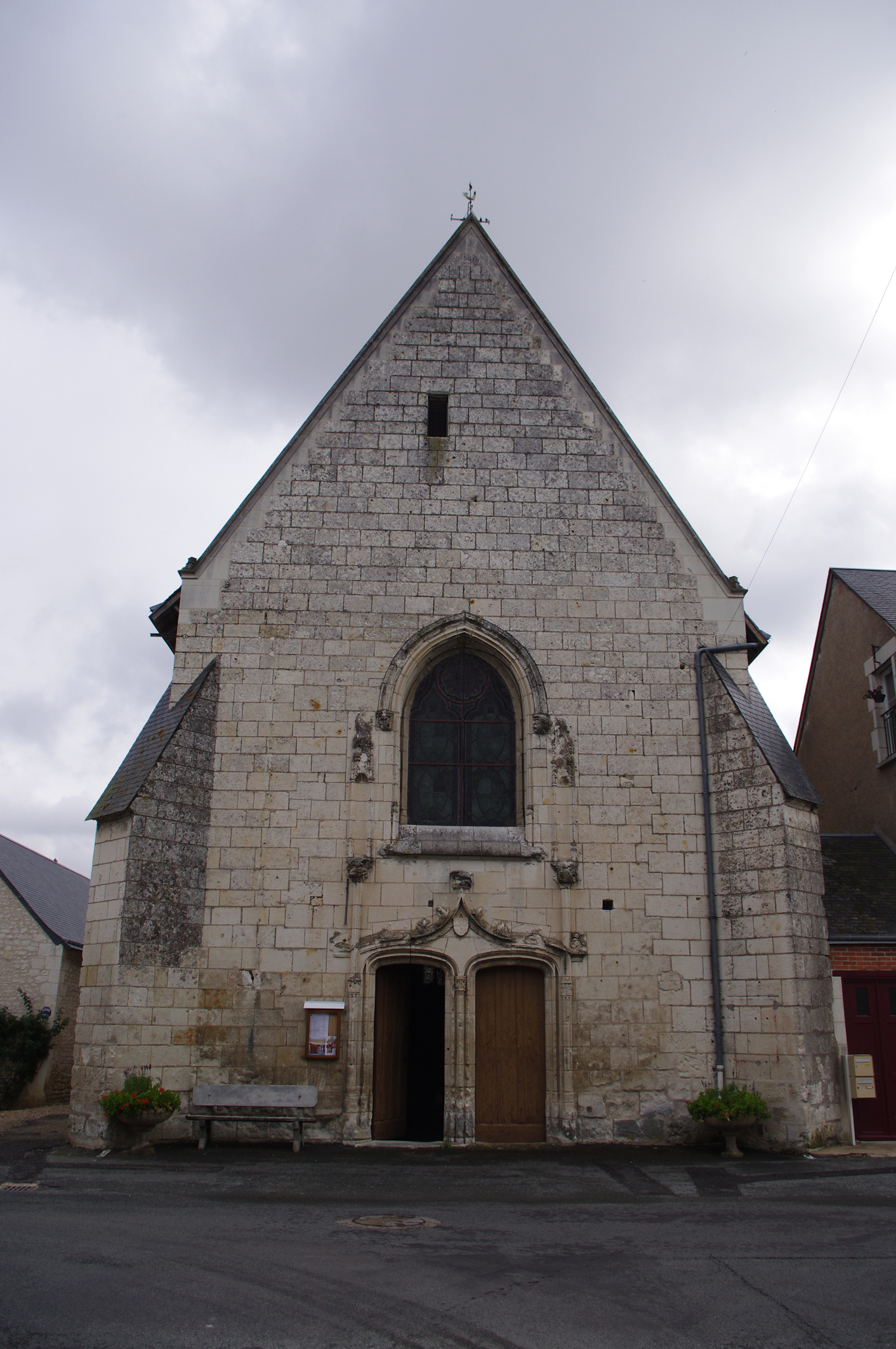 Marcilly-sur-Vienne, église Saint-Blaise, XVe siècle.